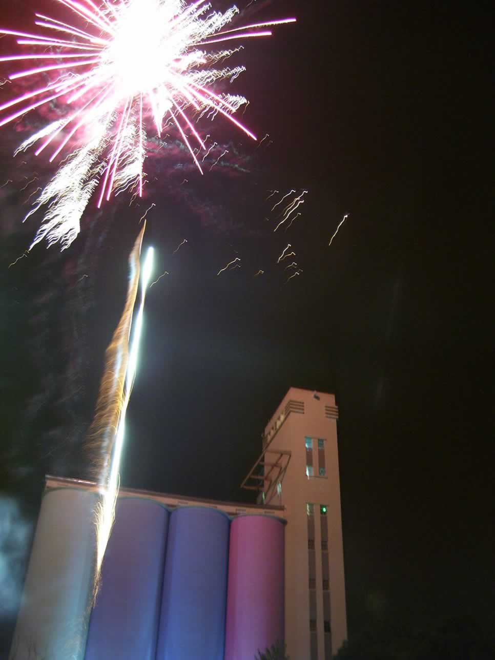 Obra presentada por Esteban Álvarez para la 3SAR07